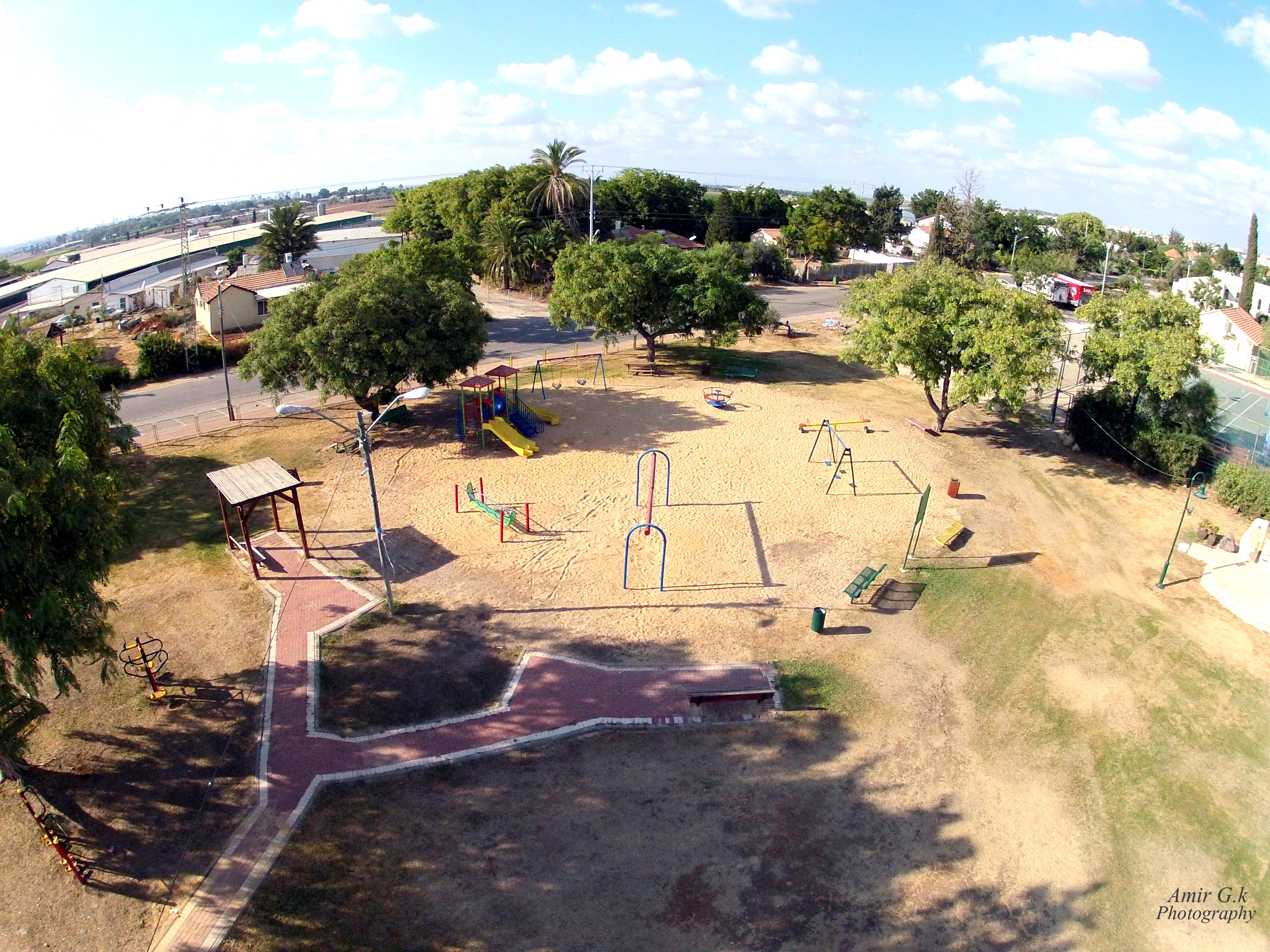 גן המשחקים במושב